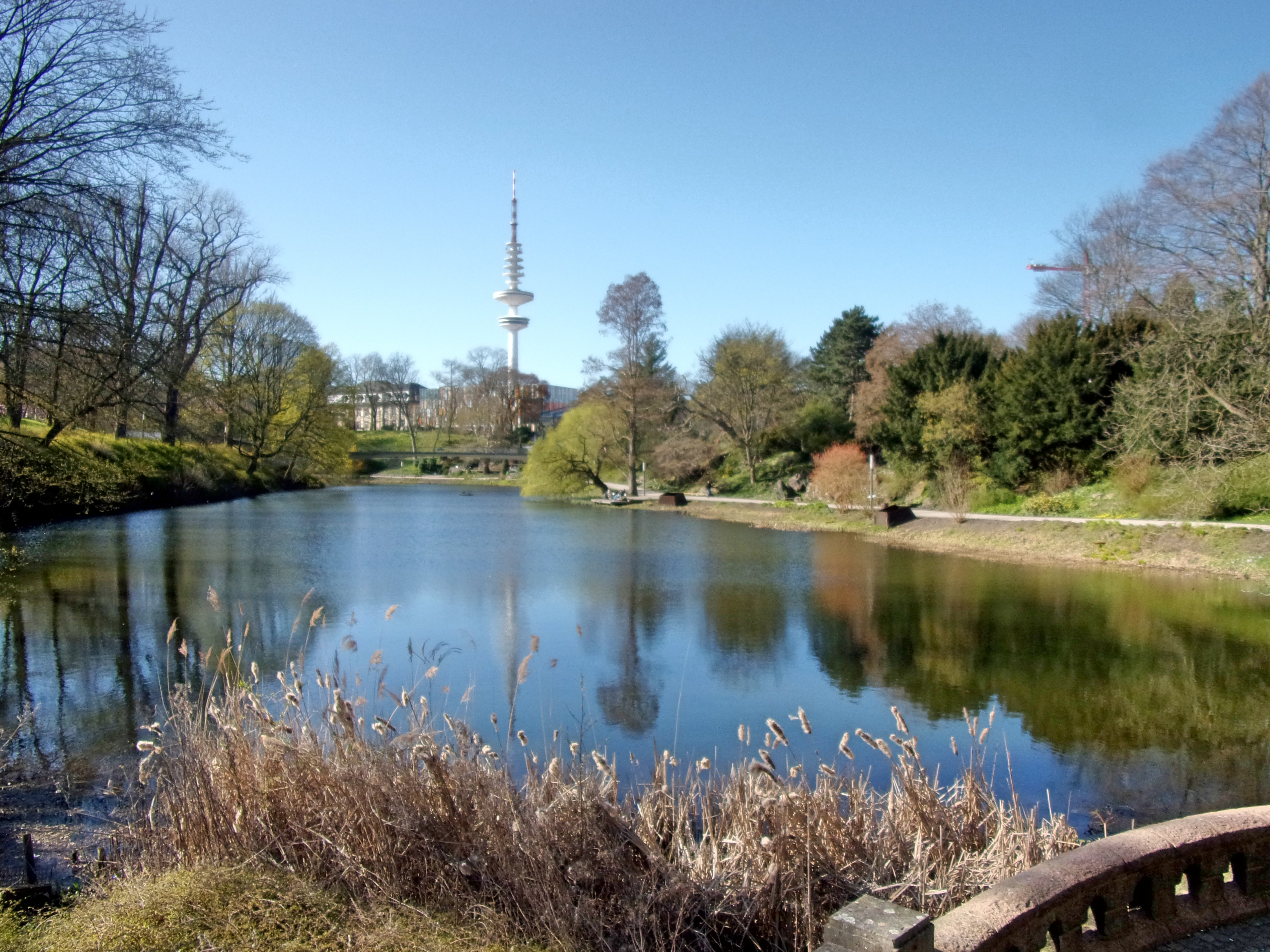 Der „Alte Wallgraben“ in Planten un Blomen, Alter Botanischer Garten. Im Hintergrund die Johan-van-Valckenburgh-Brücke und der Fernsehturm.